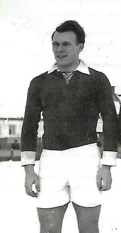 Raymond Van Gestel